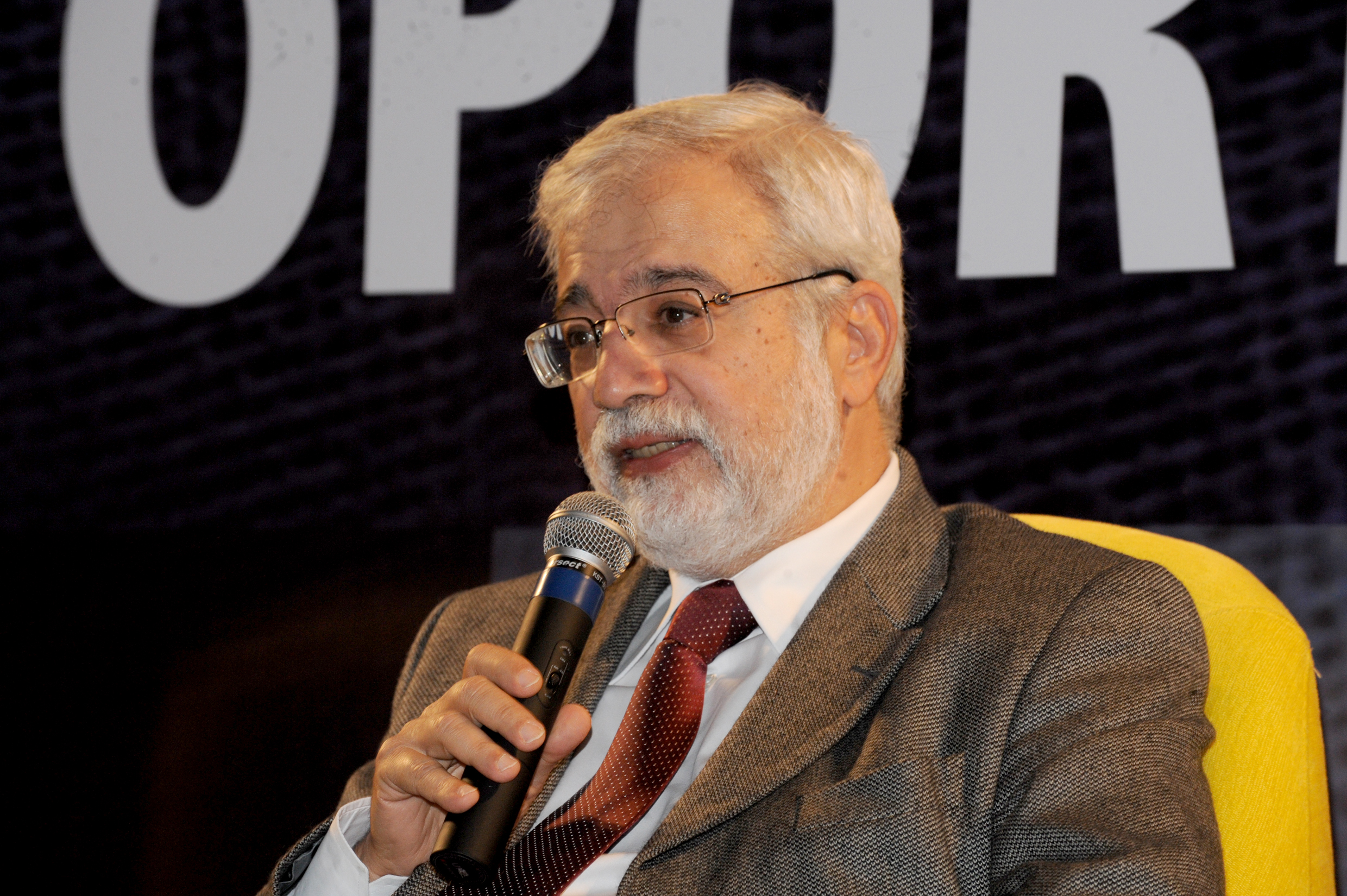 O economista Gustavo Loyola participa da abertura do seminário "O Brasil Pós-Crise: Desafios e Oportunidades", promovido pela Câmara Brasileira da Indústria da Construção.